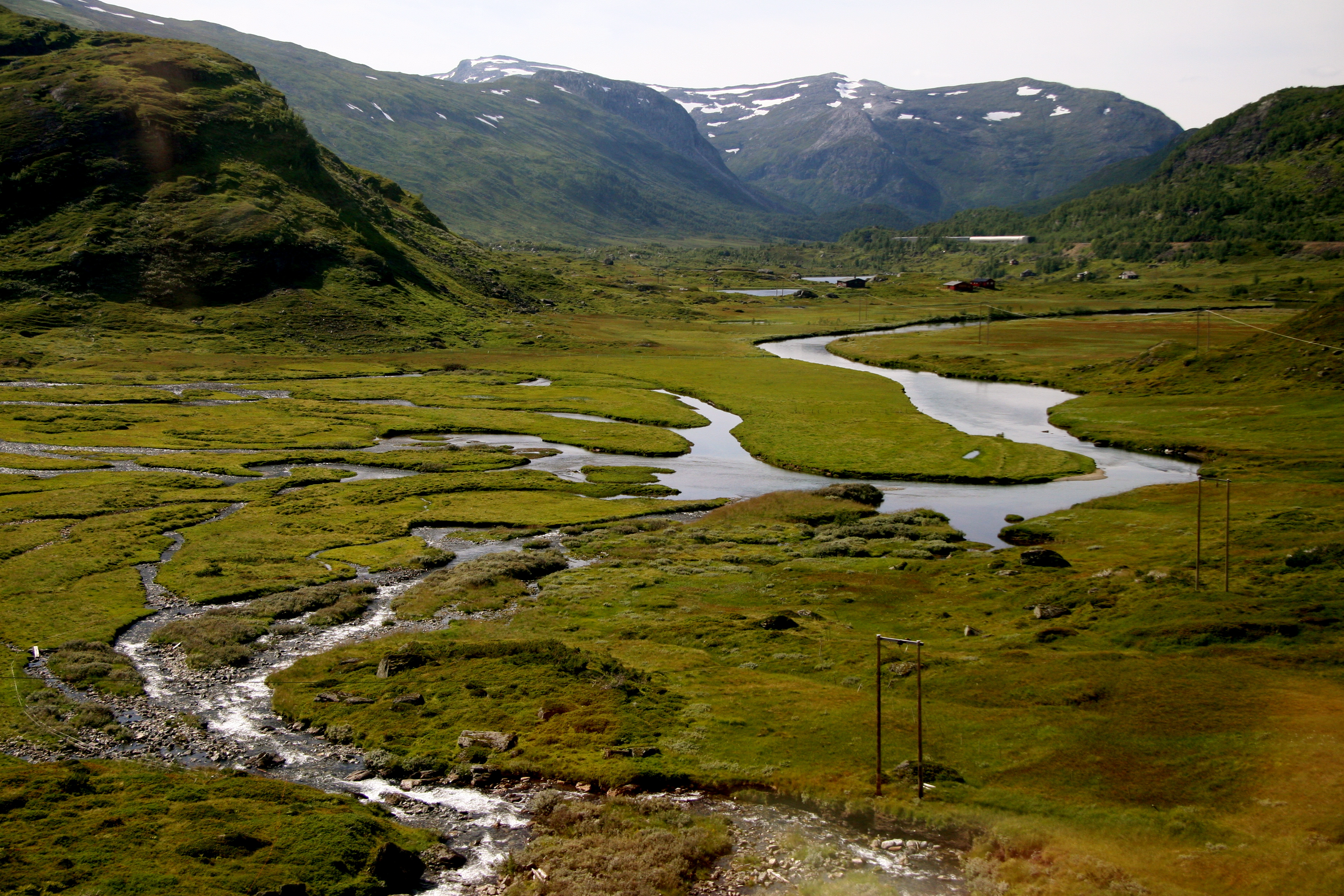 Biletet er teke frå Bergensbanen